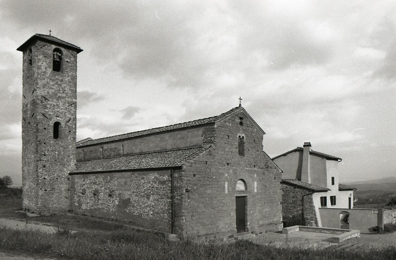 Servizio fotografico : Figline e Incisa Valdarno, 1980 / Paolo Monti. - Strisce: 7, Fotogrammi complessivi: 37 : Negativo b/n, gelatina bromuro d'argento/ pellicola ; 35 mm. - ((Sul portanegativi: N[I]K[MA]T-EL FP4. - Occasione: Campagna di rilevamento del centro storico e della tavola della Madonna del Maestro di Figline della Collegiata. - Fonte: Agenda di Paolo Monti: Nikon Leika 3001-/ Monti 1978 (1978-1982), presso Archivio Paolo Monti. - Fonte: Fattura di Paolo Monti: IV. Commesse/ Fattura n. 42/ Riprese fotografiche del centro storico di Figline e diapositive colori della Madonna del Maestro di Figline (1980/08/28), presso Archivio Paolo Monti. N. 60 diapositive a colori 24x36 mm della tavola della Madonna del Maestro di Figline della Collegiata. N. 145 fotografie del centro storico, stampate in formato 30x40 per mostra. Nelle pagine successive alla fattura si menziona il lavoro in b/n